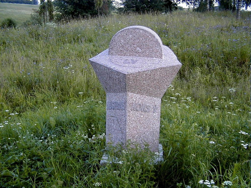 Meikšāni, Latvijas A zīme "Austras koks" 2000-07-22